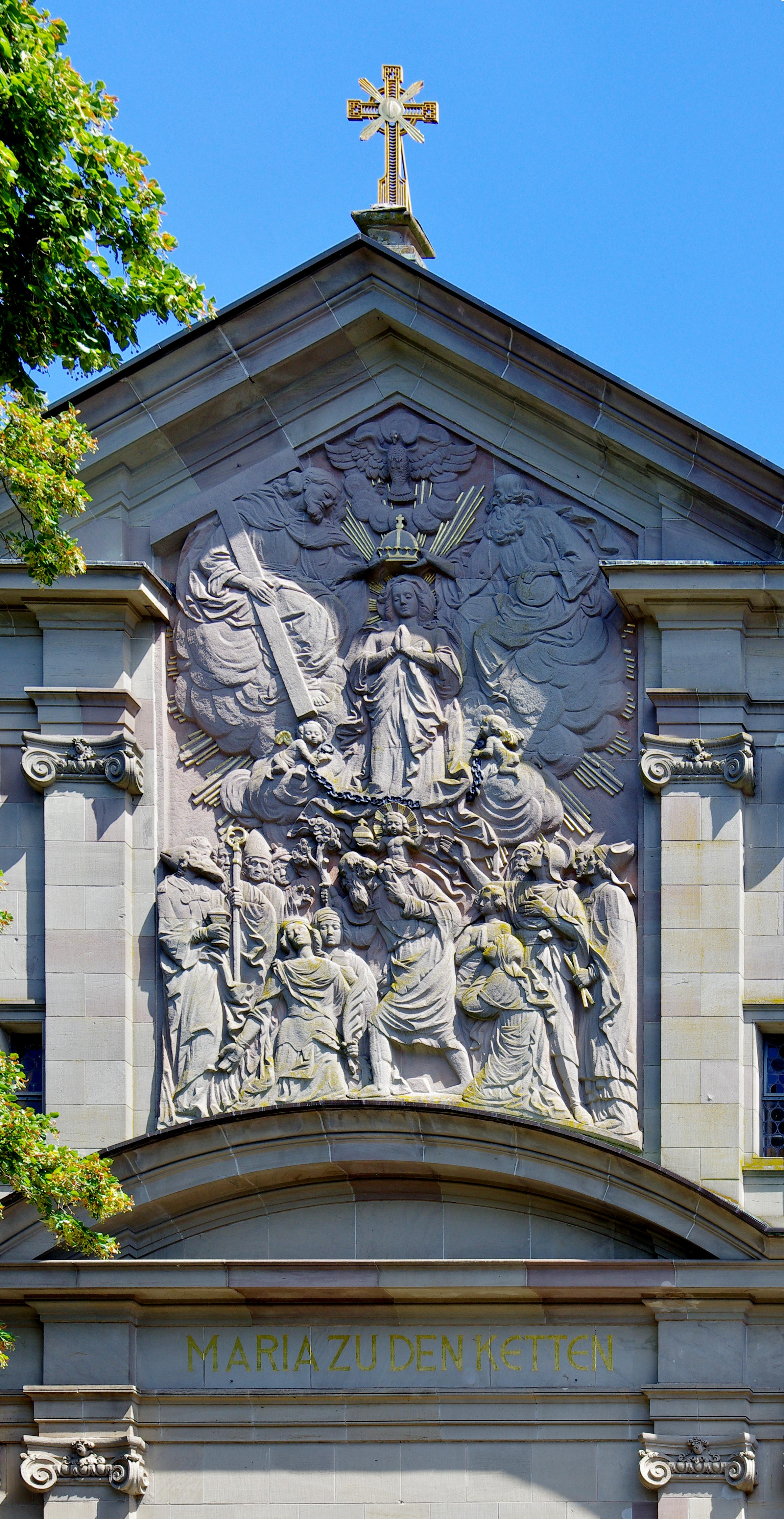 Zell am Harmersbach